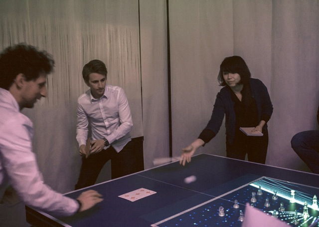 Partido de PingPongO en Oslo